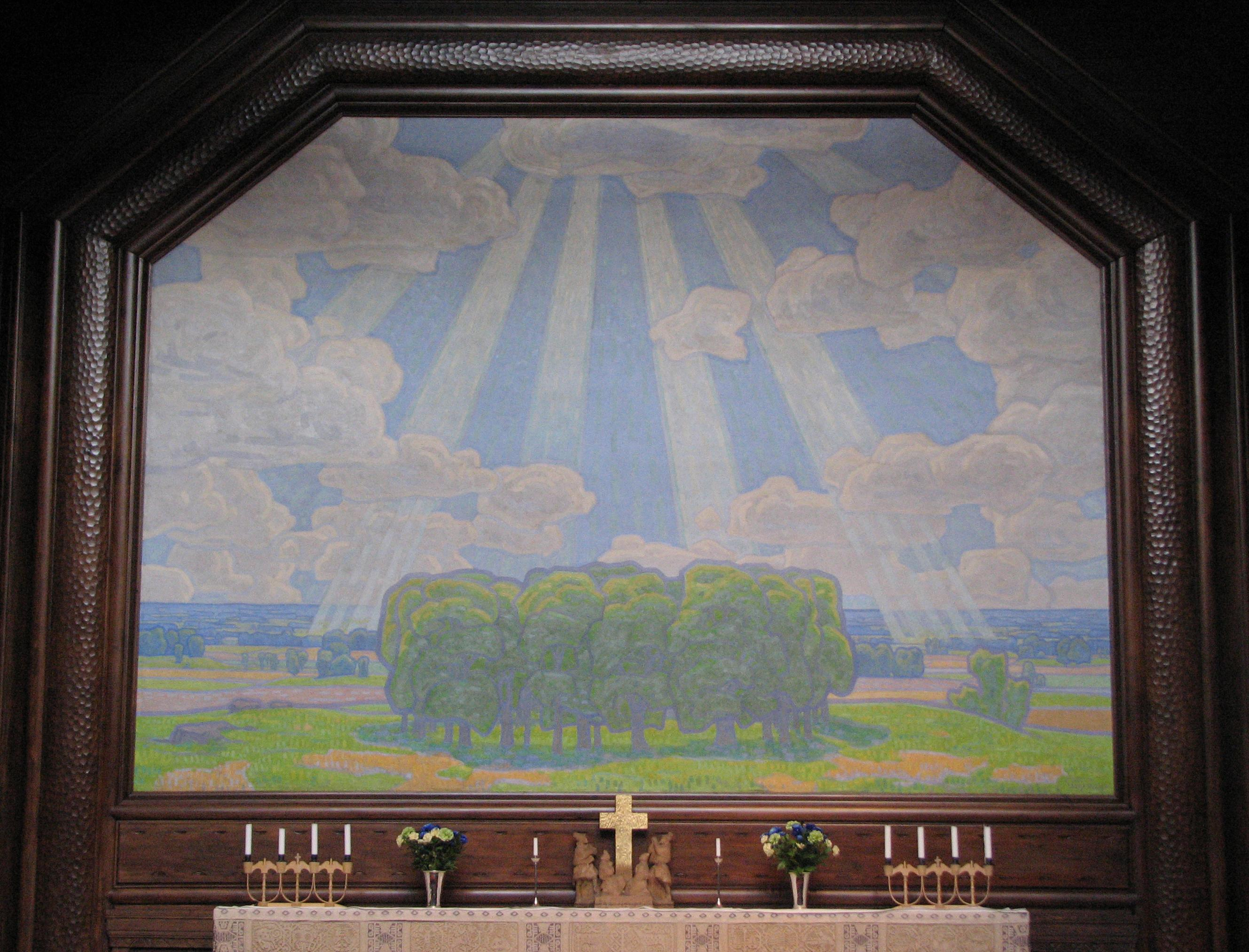 Kiruna church. Sweden. Year 2009